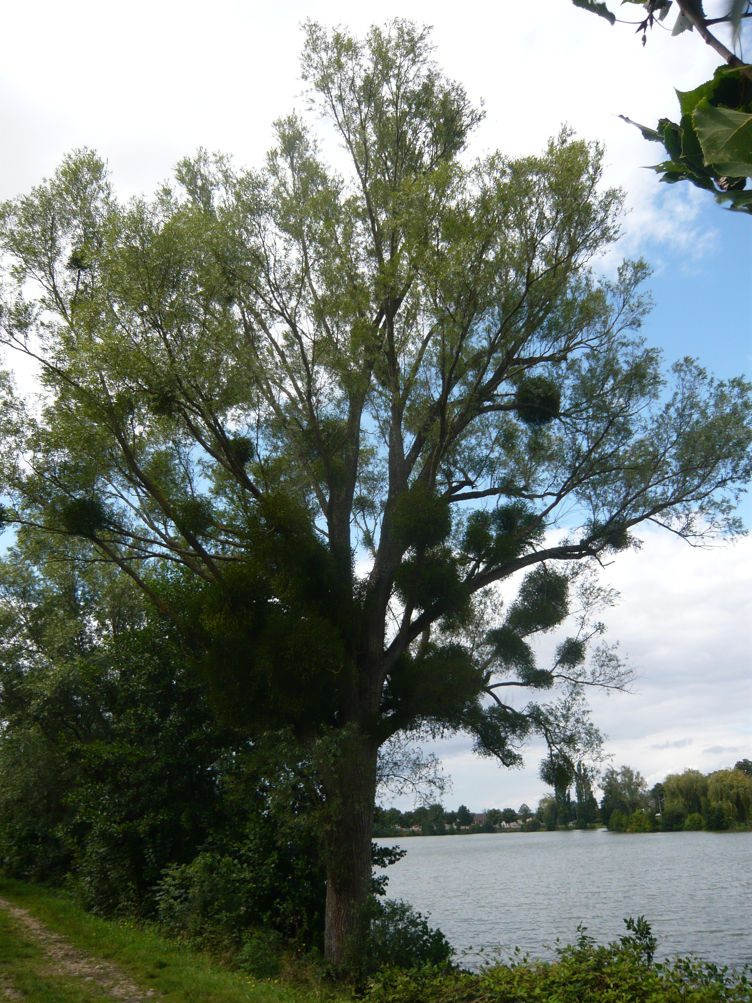 Étang de Saint-Georges-sur-Eure, Eure-et-Loir (France).